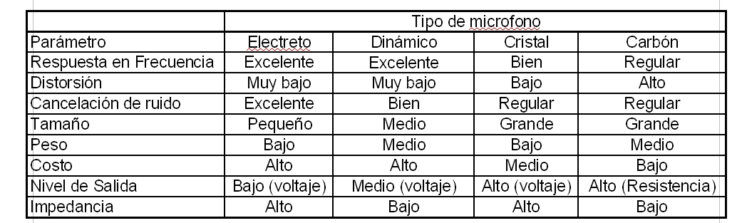 Aparato Fonador Humano